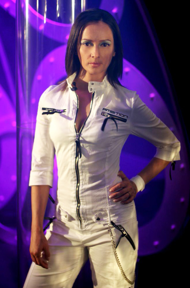 2010 - Virtual Arena Foto Set: Emanuela Pacotto